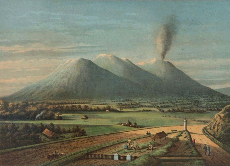 Litho. Pagina 20 van de map "De Indische Archipel", Den Haag, 1865-1876 met daarin 24 kleurenlitho's, van objectnr. 3728-430 t/m 3728-479.. De vulkaan Merapi